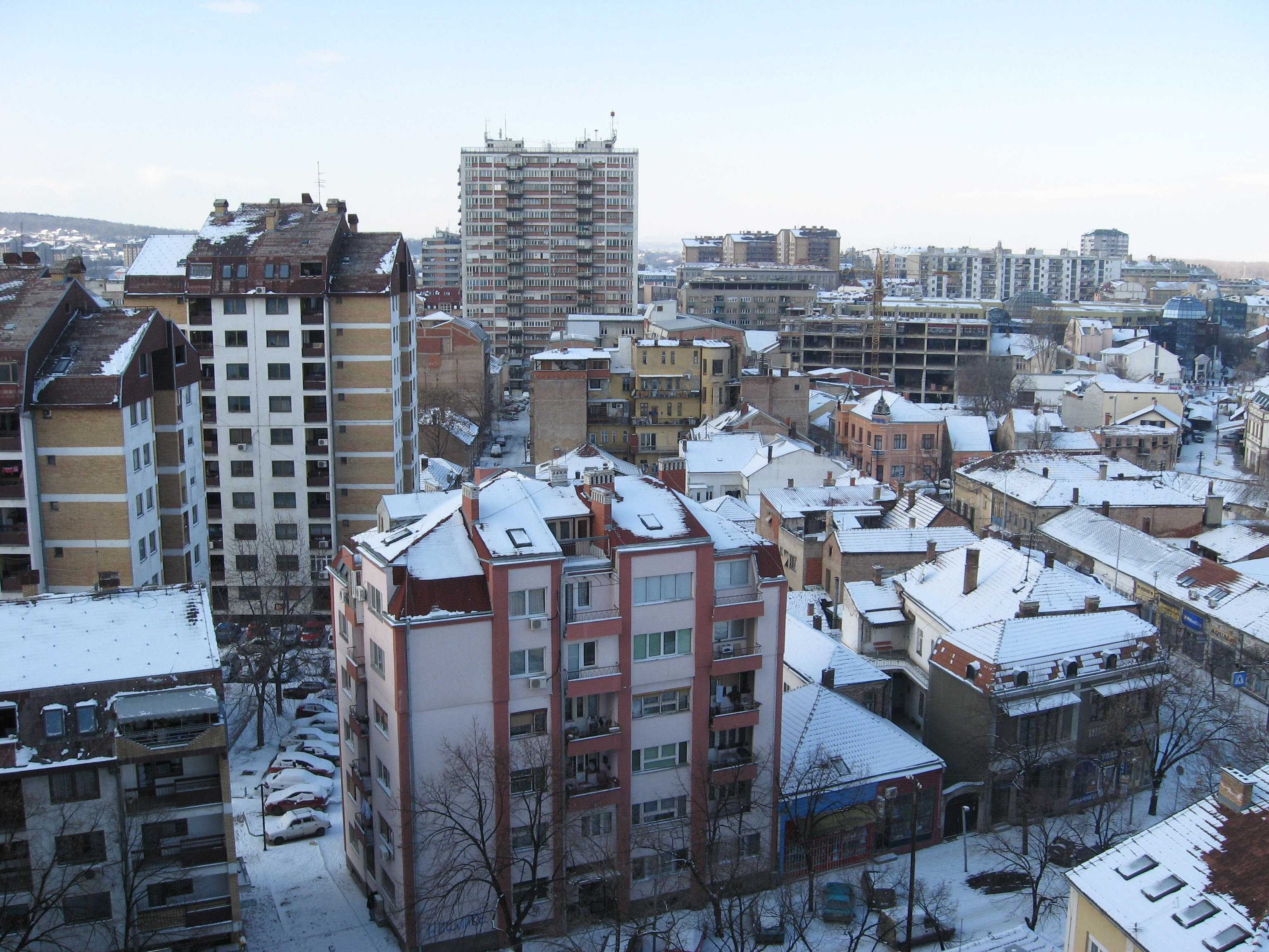 Драган Цветковић Ниш